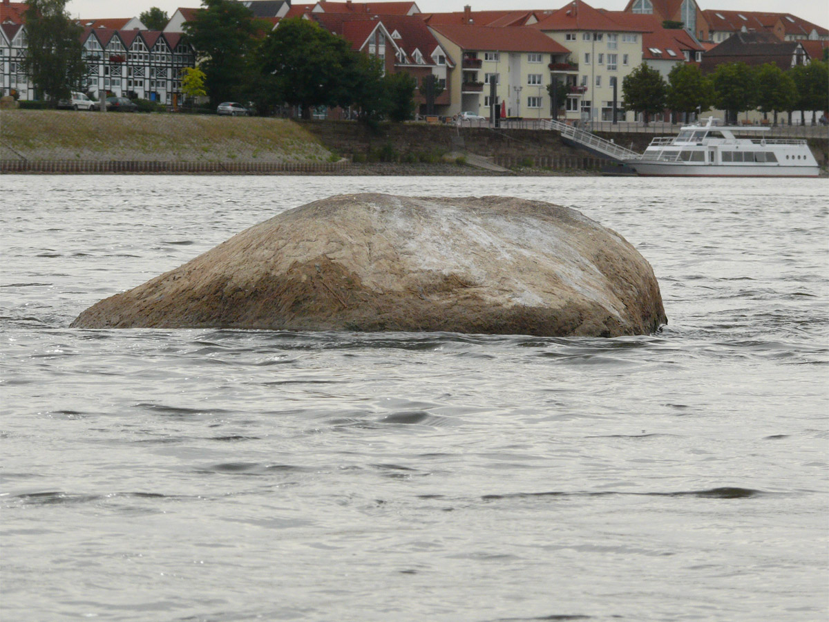 Hungerstein in Schönebeck (Elbe) bei etwa 95 cm Pegelstand am Elbepegel Schönebeck